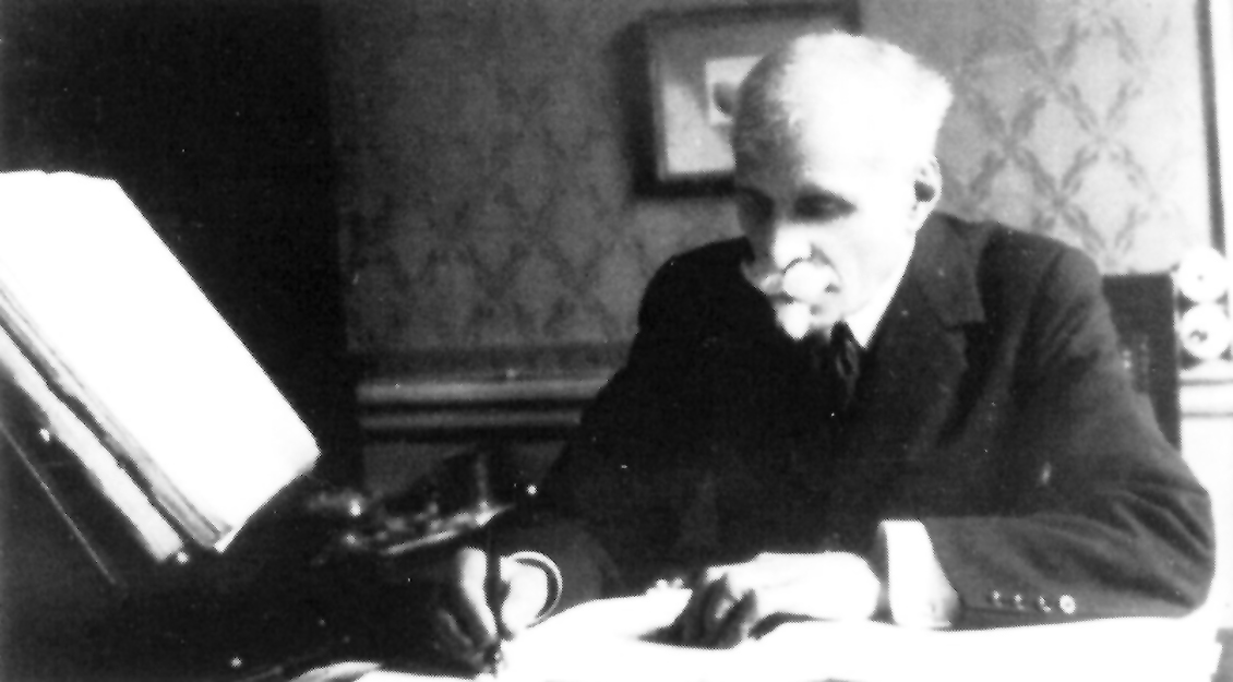 Maurice Emmanuel dans les années 30